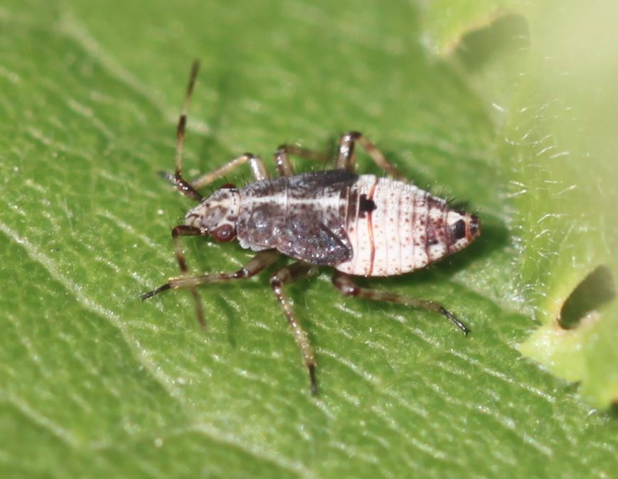 Nymphe von Deraeocoris flavilinea am 22. Mai 2019 in Walldorf/Baden